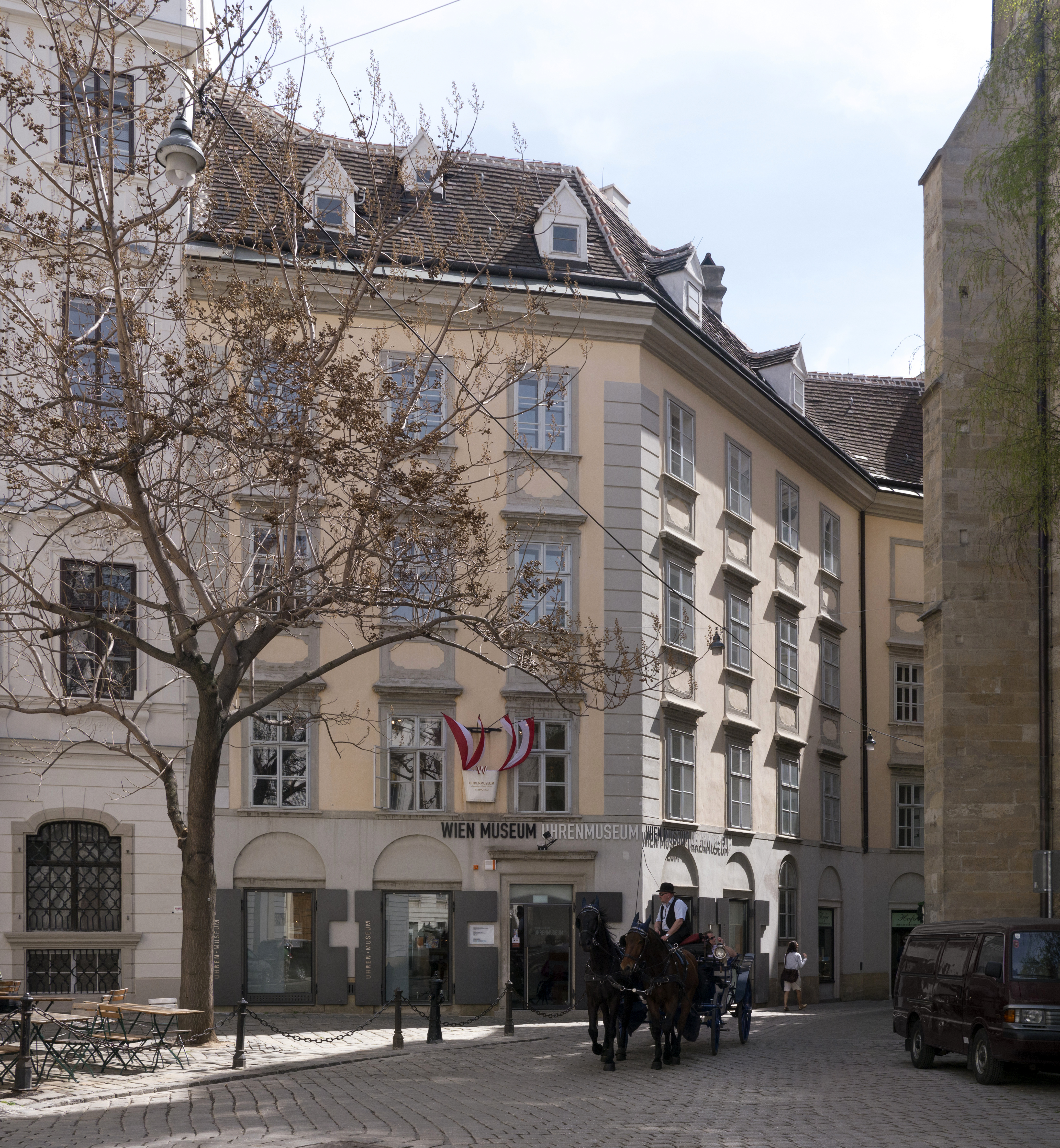 Ehem. Palais Obizzi, Uhrenmuseum